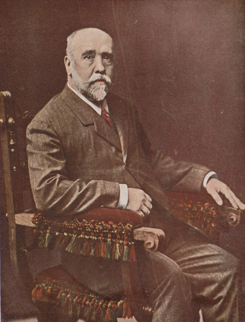 Miguel Echegaray; fotografía de Franzen